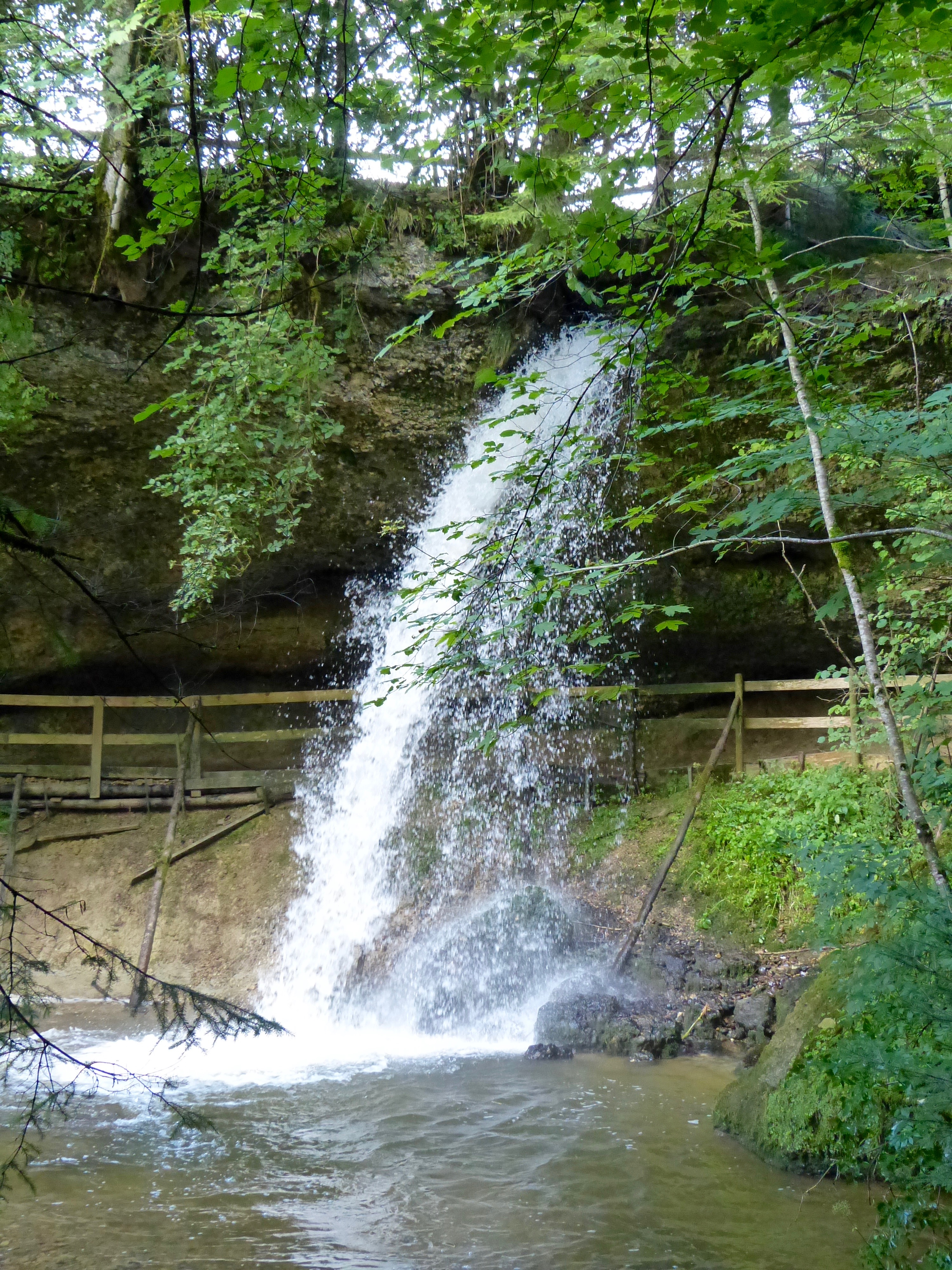 WikiProjekt Landstreicher Geotop Scheidegger Wasserfälle